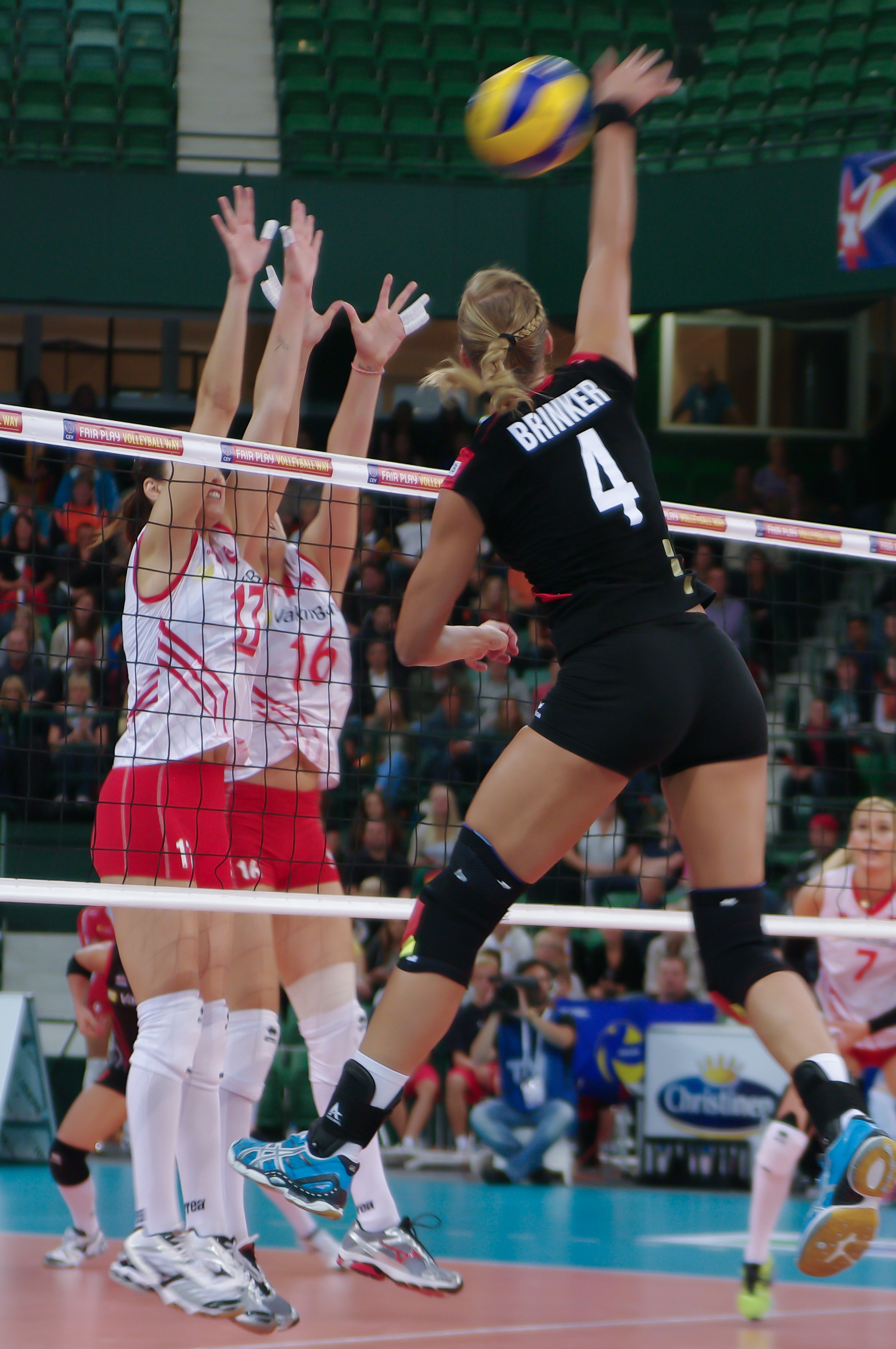 Fotos Moritz Kosinsky aus dem Jahr 2013